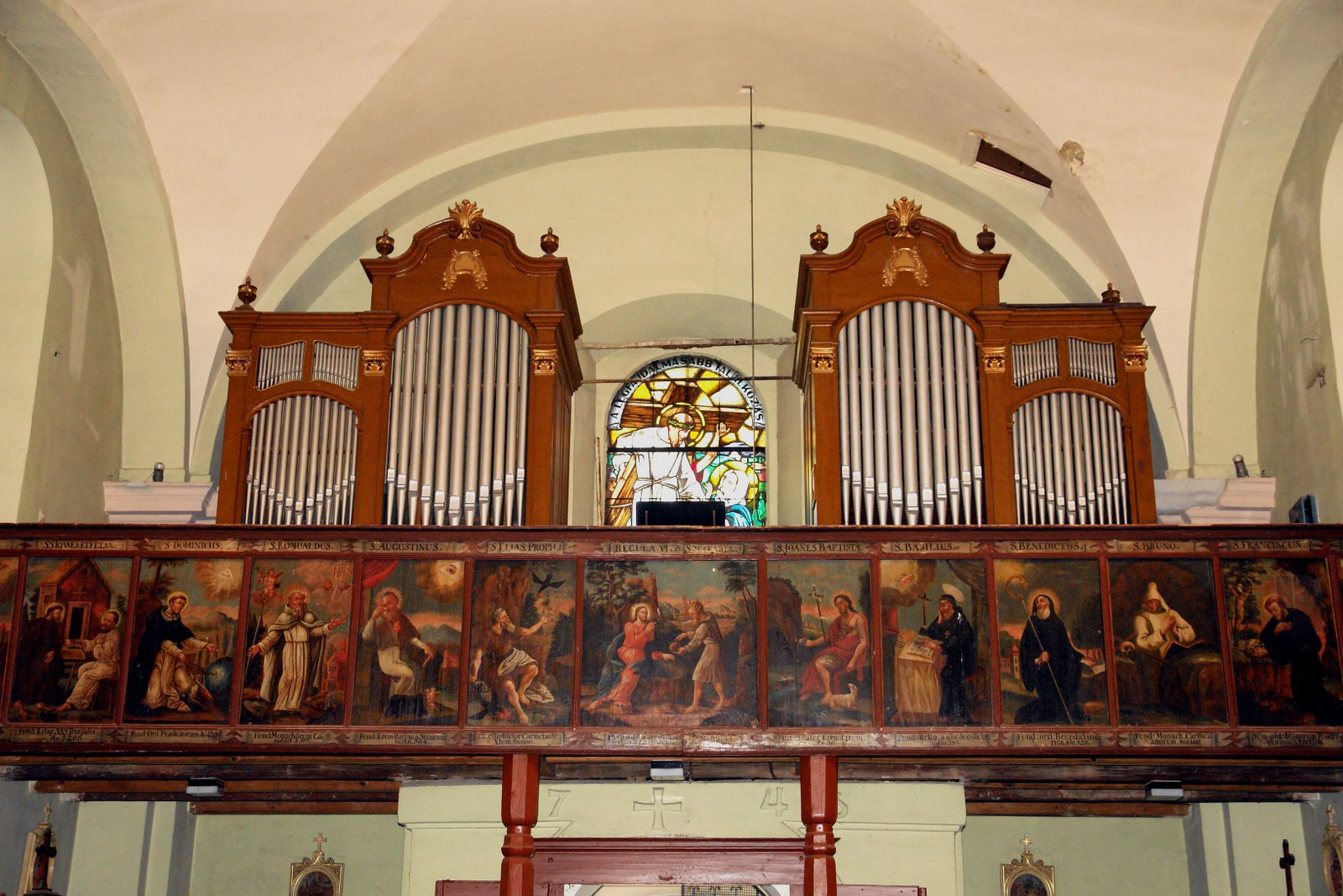 Péliföldszentkereszt, a templom orgonája és díszesen festett karzatmellvédje